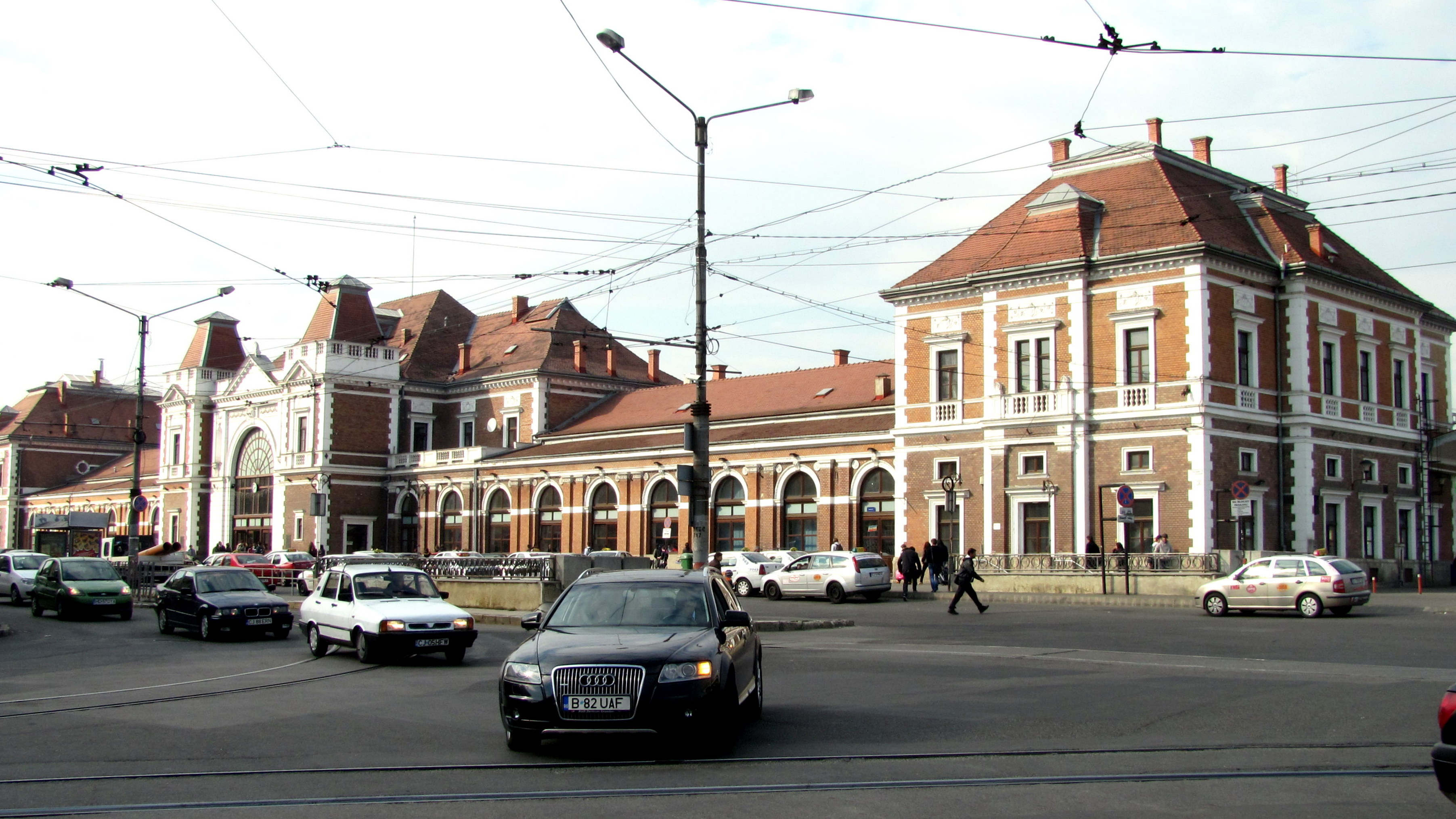 Piața Gării - Gara Cluj-Napoca